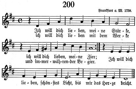 Angelus Silesius: Ich will dich lieben, meine Stärke, 1. Strophe mit der auch im EG 1993 enthaltenen Melodie. In: Evangelisches Gesangbuch (für die Schutzgebiete), Berlin 1915